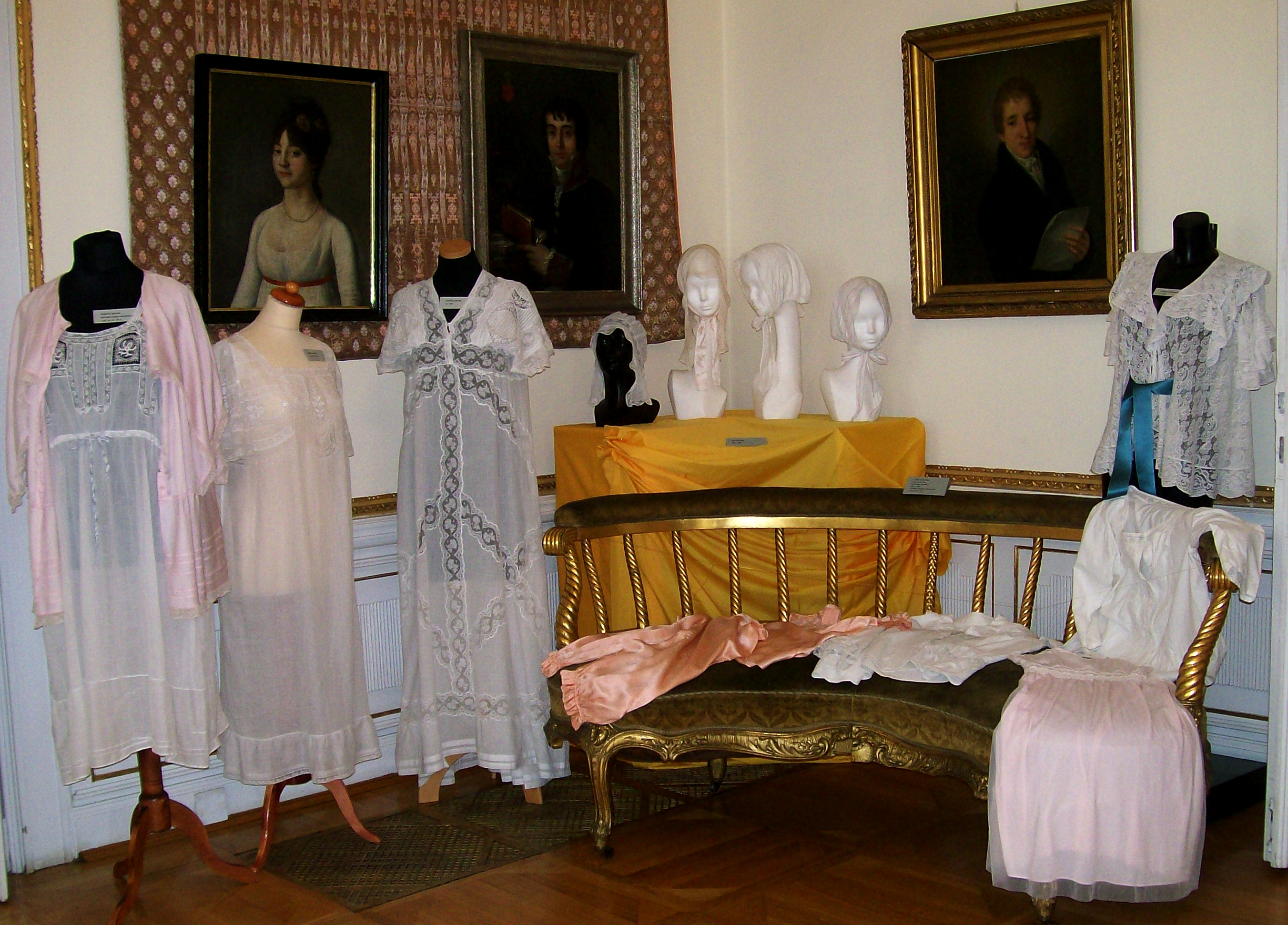 Muzeum Zagłębia w Będzinie. "Od pantalonów do stringów" - Wystawa ze zbiorów Centralnego Muzeum Włókiennictwa w Łodzi, czerwiec-wrzesień 2008.